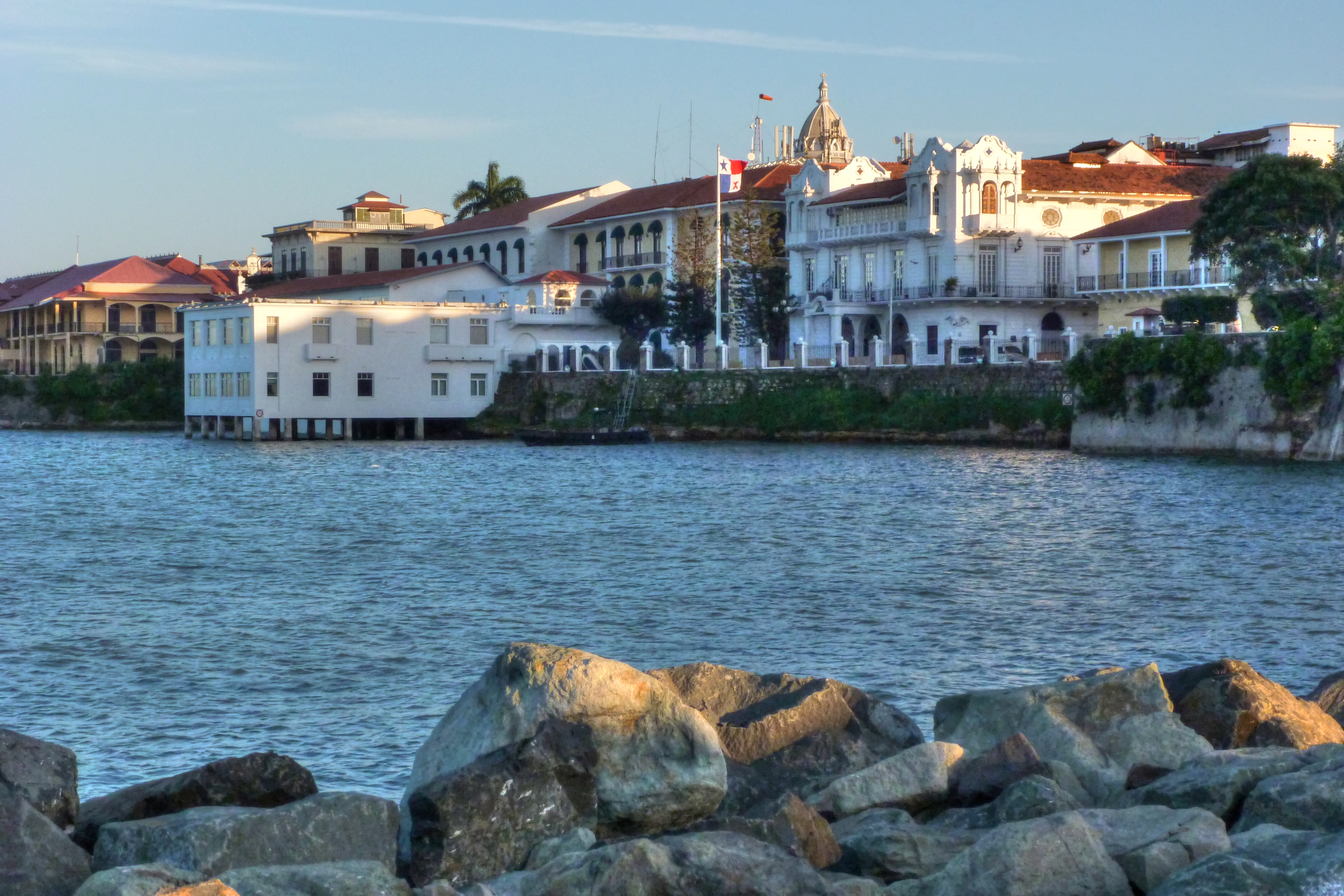 Palacio Presidencial, desde el paseo de la cinta costera a la altura de la entrada de Casco Antiguo